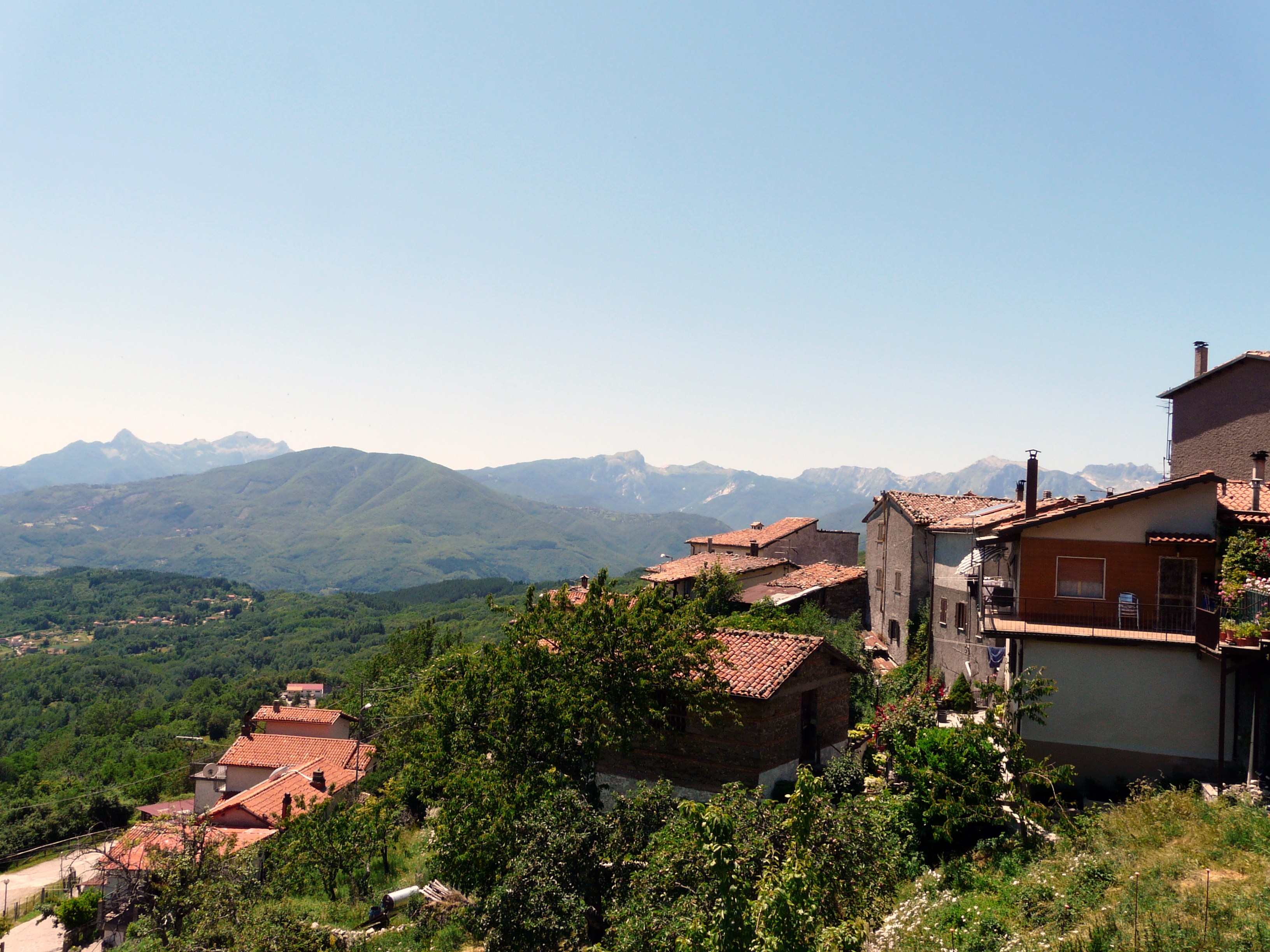 Panorama di Corfino, Villa Collemandina, Toscana, Italia